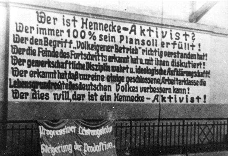 SBZ, Plakat der Aktivisten-Bewegung Aktivisten-Propaganda in einem volkseigenen Betrieb. [Sowjetische Besatzungszone.- Propagandaplakat der Hennecke-Bewegung in einem volkseigenen Betrieb.] Information added by Wikimedia users.Text des Plakates:Wer ist Hennecke-Aktivist? Wer immer 100 % sein Plansoll erfüllt! Wer den Begriff „Volkeigener Betrieb“ richtig verstanden hat! Wer die Feinde des Fortschritts erkannt hat u. mit ihnen diskutiert! Wer gewerkschaftliche Disziplin wahrt u. ideologische Aufklärung schafft! Wer erkannt hat, daß nur eine einige geschlossene Arbeiterklasse die Lebensgrundrechte des deutschen Volkes verbessern kann! Wer dies will, der ist ein Hennecke-Aktivist! Aufschrift des Banners darunter: Progressiver Leistungslohn Steigerung der Produktion.